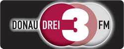 Logo des Radiosenders DONAU3FM